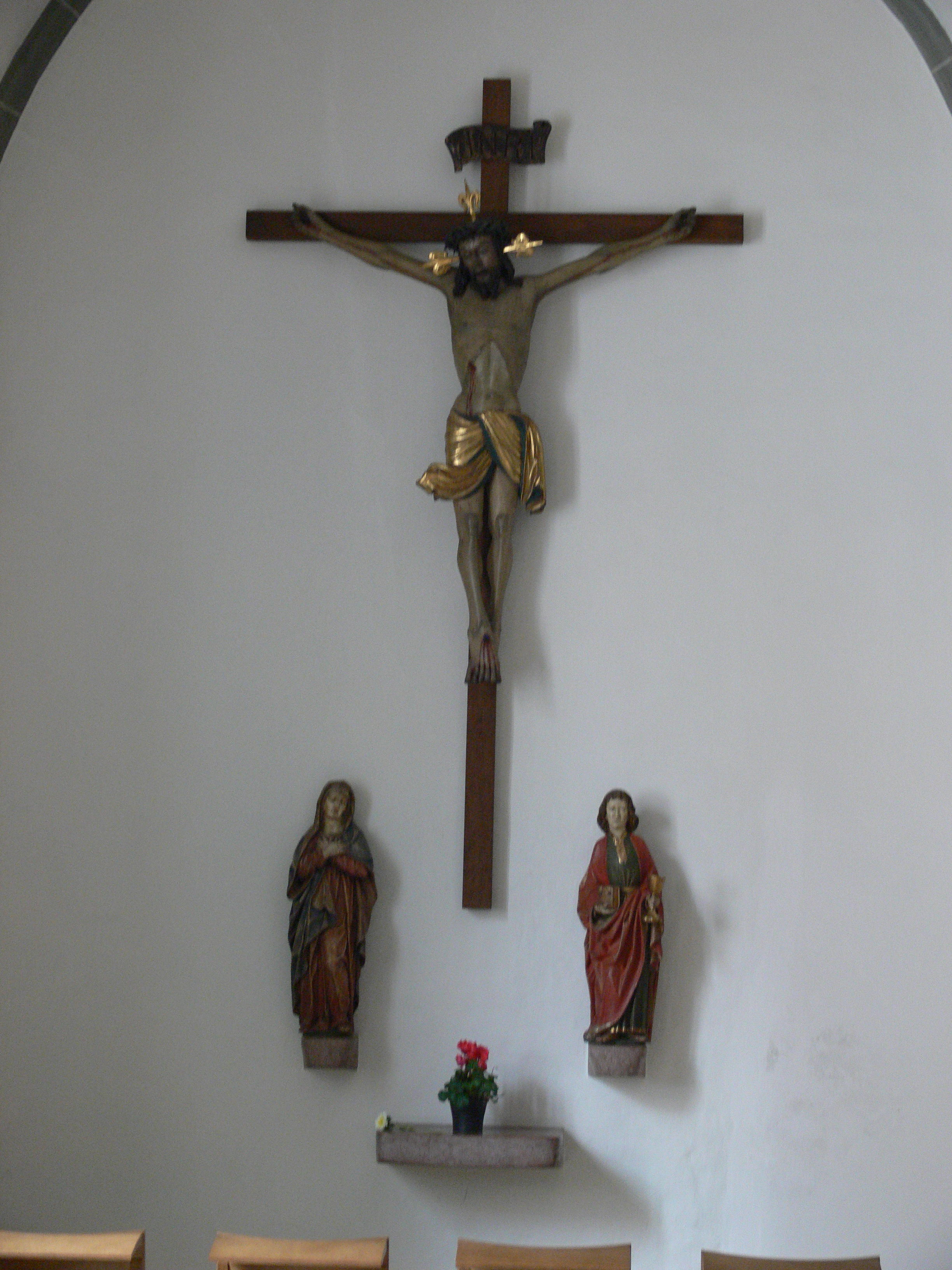 Stadtpfarrkirche St. Martin, Biberach an der RissBrandenburgkapelle (angebaut an das nördliche Seitenschiff) Kreuzigungsgruppe, Kruzifix, (dem Umfeld von) Michael Zeynsler zugeschrieben (um 1520), daneben Schmerzensmutter und Apostel Johannes aus dem späten 15. Jh.